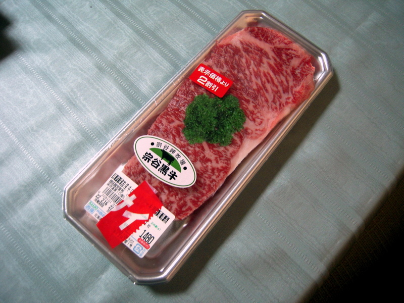 宗谷黒牛のサーロイン